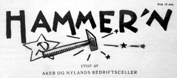 Avishode for NKPs bedriftsavis på Nyland og Akers mekaniske verksted, 1925